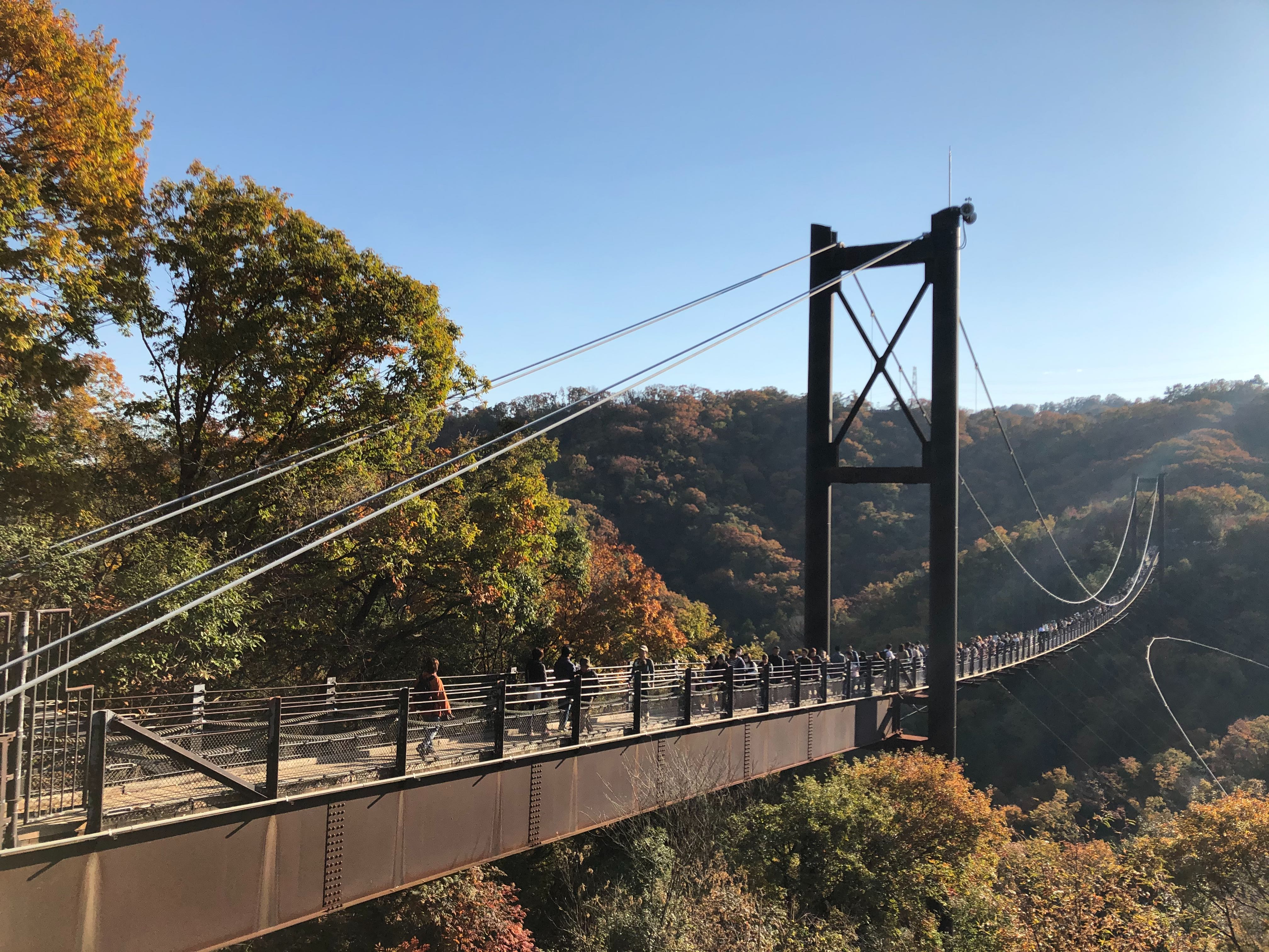 星のブランコ